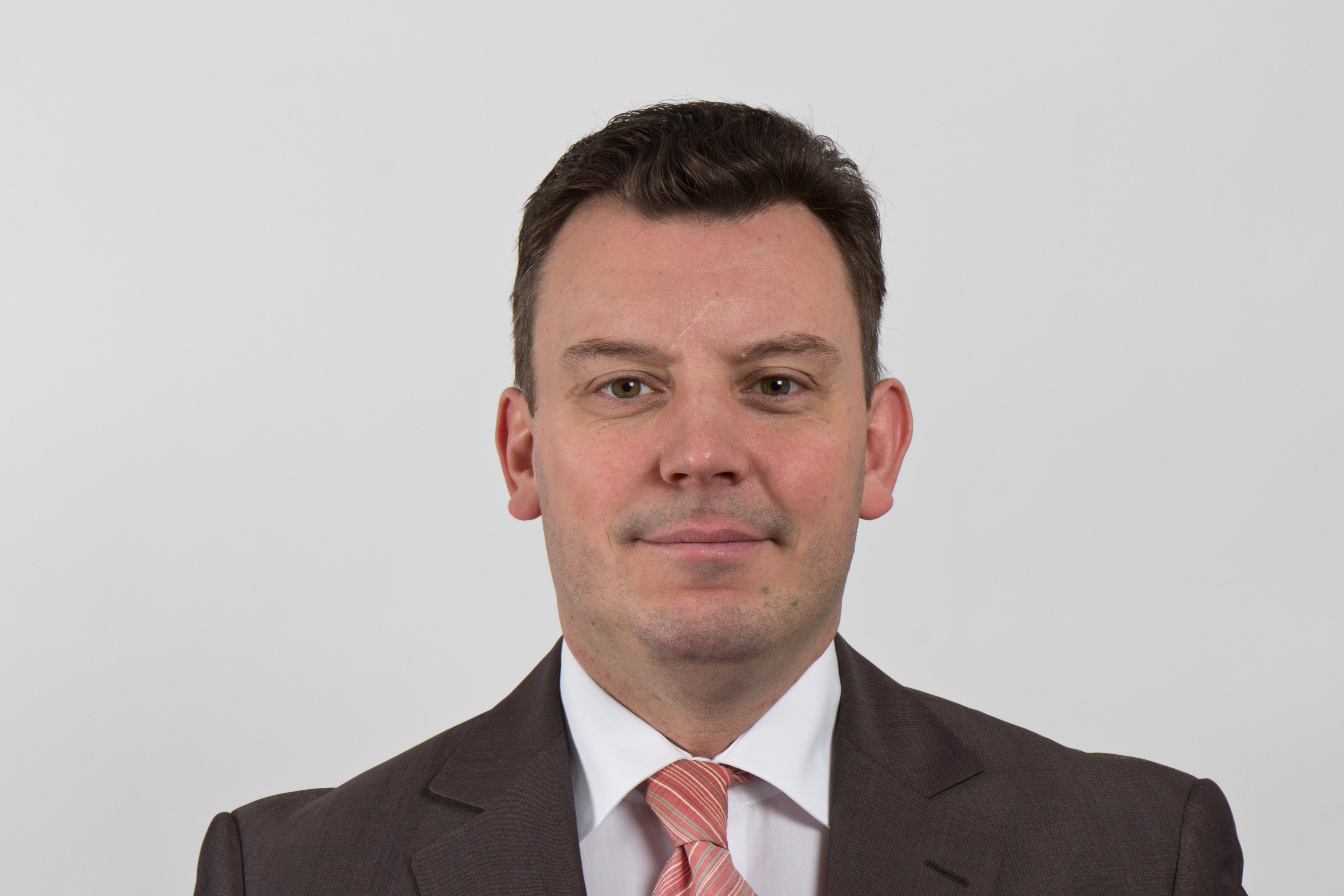 André Schröder (* 21. April 1969 in Sangerhausen) ist ein deutscher Politiker (CDU) und Mitglied im des Landtags in Sachsen-Anhalt. Wikipedia im Landtag – Sachsen-Anhalt 13./14. Dezember 2012 in MagdeburgDieses Foto wurde im Rahmen des Projektes „Wikipedia im Landtag“ erstellt. The making of this document was supported by the Community-Budget of Wikimedia Germany. The making of this work was supported by Wikimedia Austria. For other files made with the support of Wikimedia Austria, please see the category Supported by Wikimedia Österreich. Personality rights warningAlthough this work is freely licensed or in the public domain, the person(s) shown may have rights that legally restrict certain re-uses unless those depicted consent to such uses. In these cases, a model release or other evidence of consent could protect you from infringement claims.